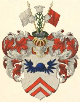 Schwengelmi suguvõsa aadlivapp